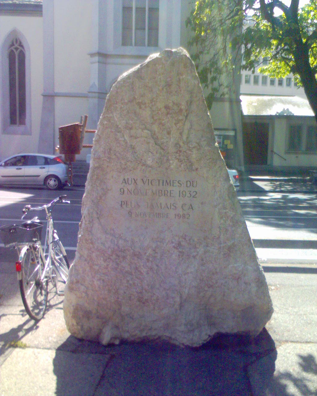 Monument commémorant les morts de la fusillade du 9 novembre 1932 (Genève - Suisse). Ici à son ancien emplacement, à l'extrémité sud de la Plaine de Plainpalais. Le 10 septembre 2008, le Conseil d'État genevois autorise son déplacement sur le parvis de l'université, à l'emplacement exact de la fusillade ([ Point de presse du Conseil d'État du 10 septembre 2008).